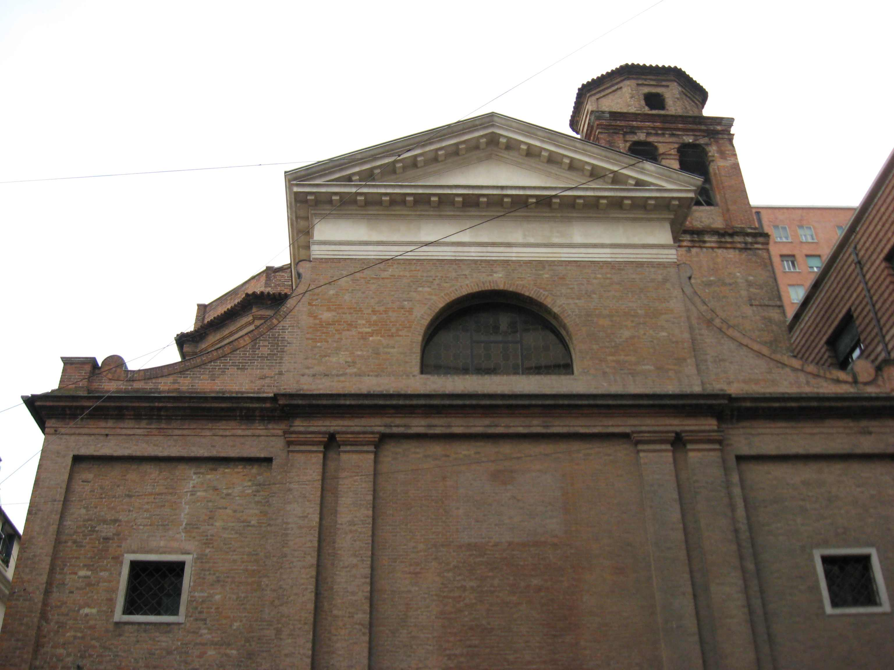 Chiesa S. Lucia Padova